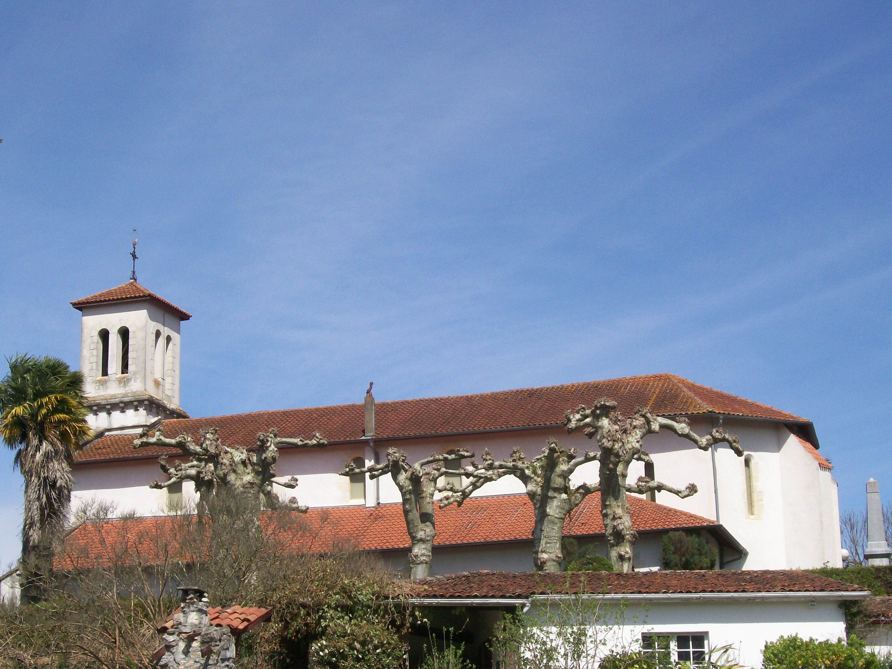 Akamarreko eliza